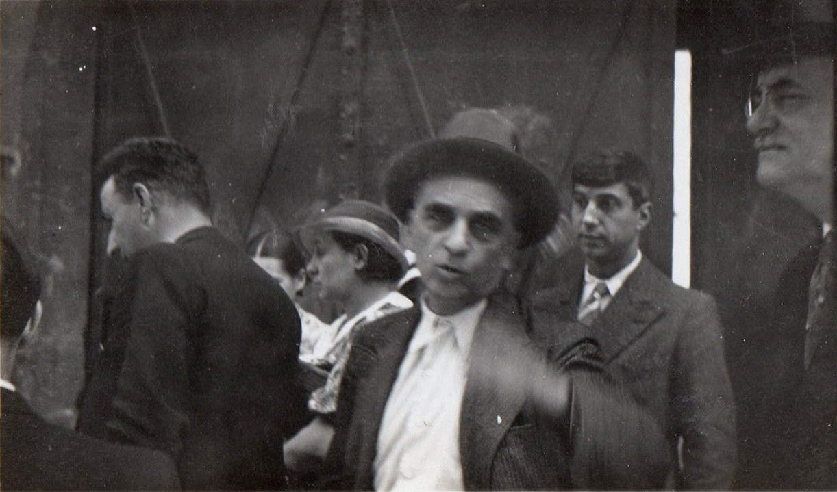 Paul Faure (au centre, au premier plan) et Georges Monnet (à l'arrière-plan) vers 1935.